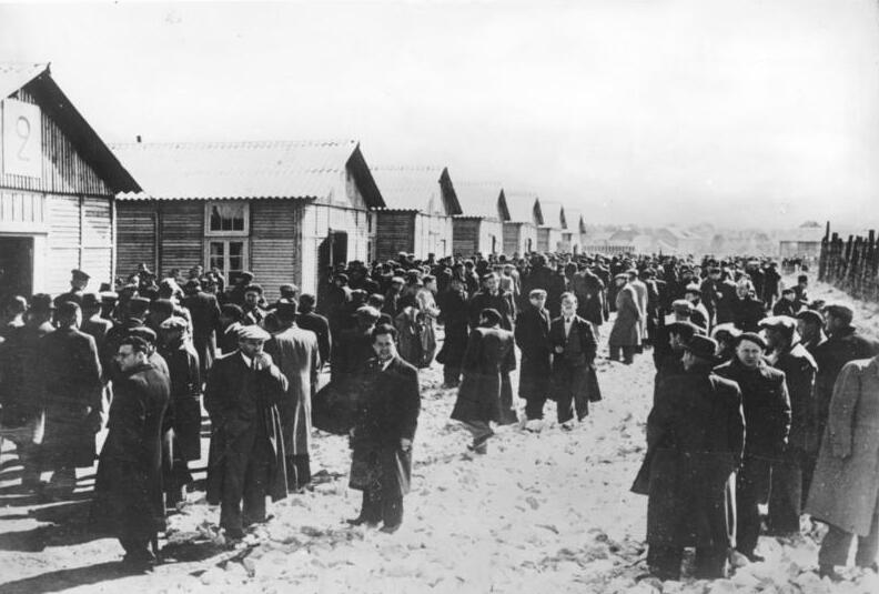 Pithiviers, Juden im Internierungslager ADN-ZB Frankreich in der Periode der deutschen Okkupation und des Vichy-Regimes 1940/44 Ein neuer Transport ausländischer Juden, die in Paris festgenommen wurden, ist im Internierungslager Pithiviers im Departement Loiret eingetroffen. (Auf.: 1941) 5332-41